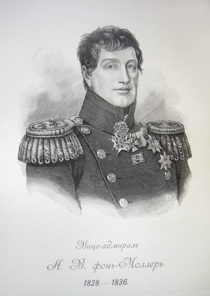 Морской министр Российской империи адмирал Антон Васильевич фон Моллер (1764-1848)